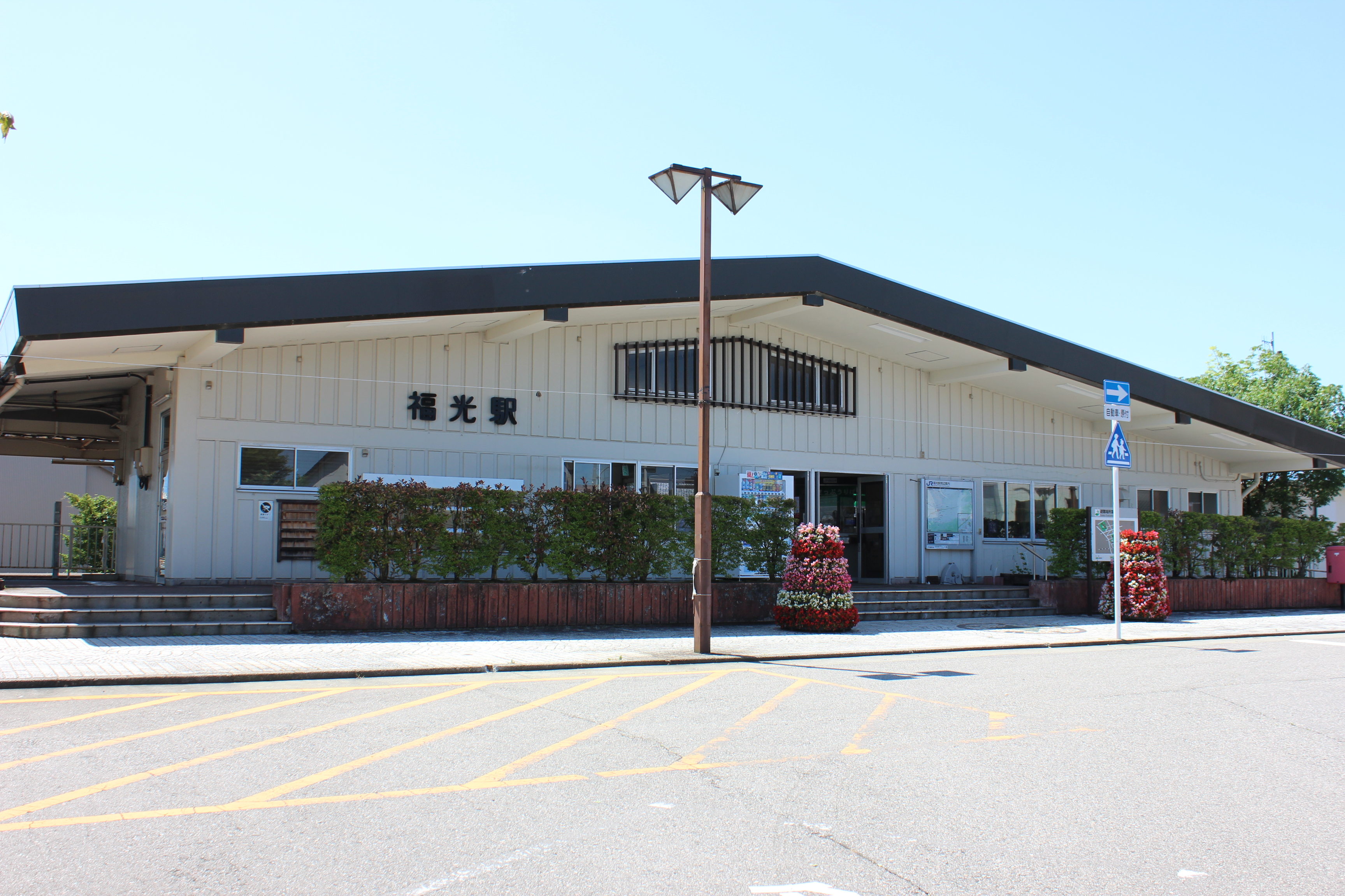 JR城端線福光駅（富山県南砺市） Canon EOS Kiss X5